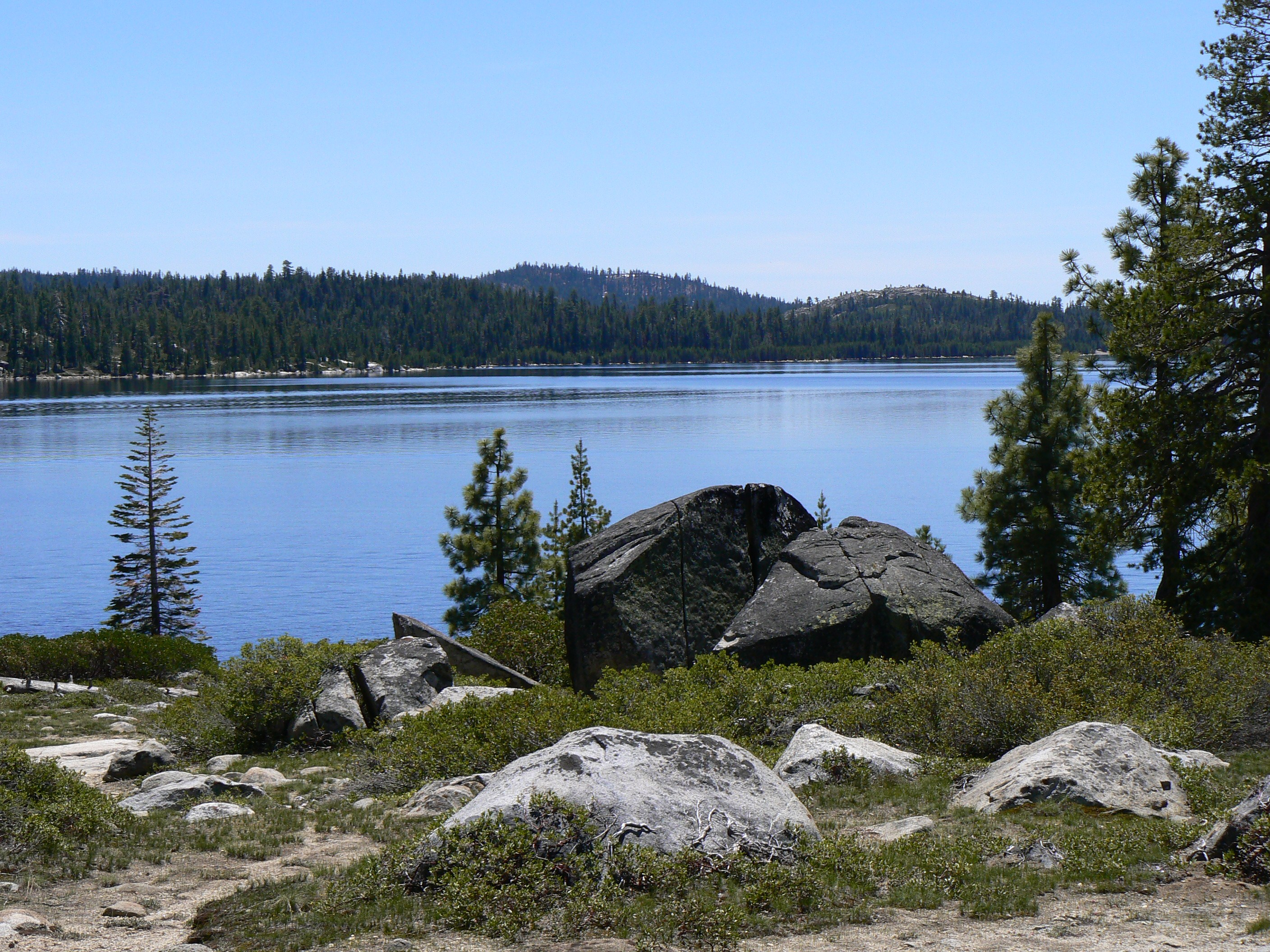 Loon Lake, Sierra Nevada , California.